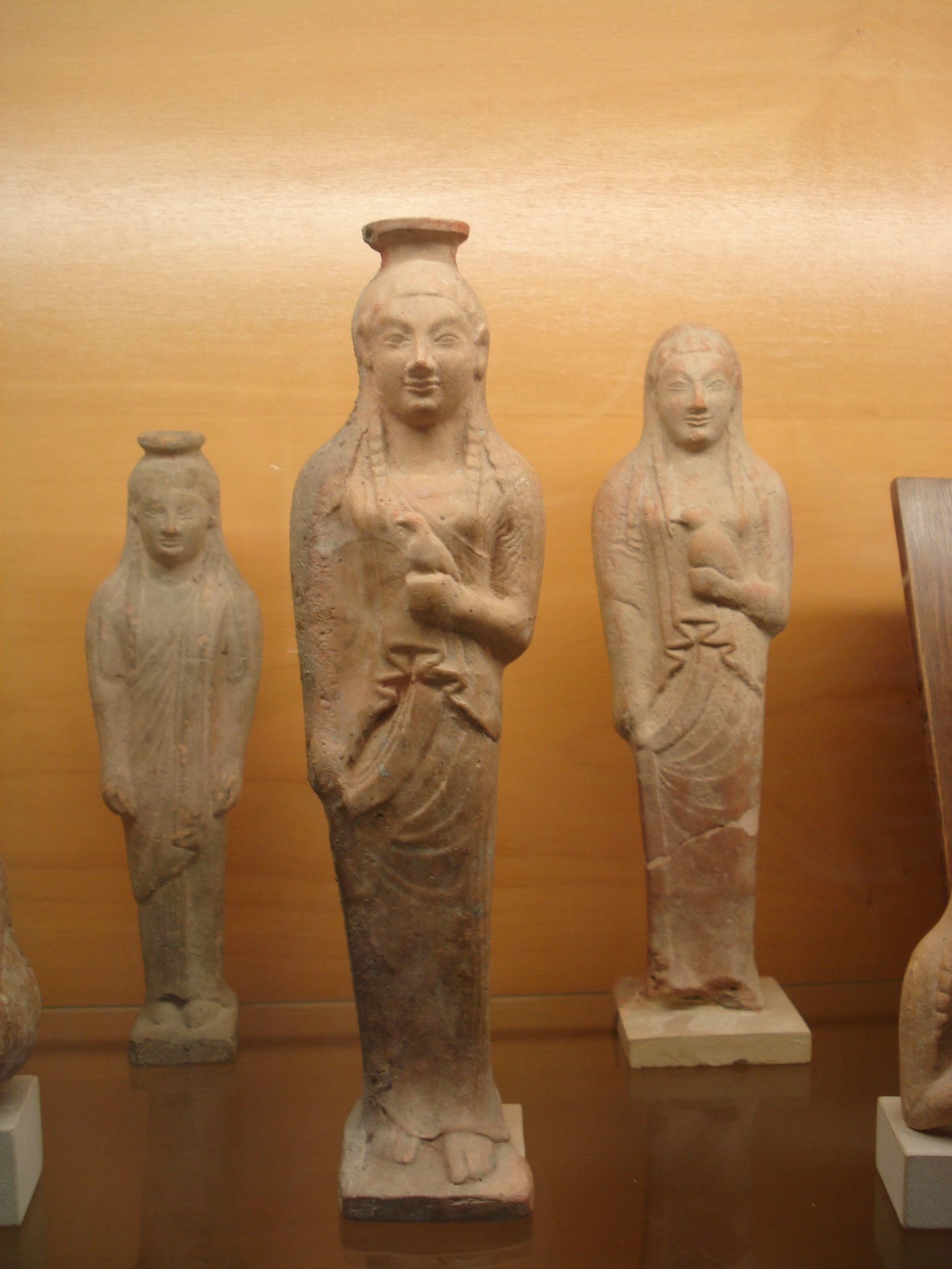 Ex voto greci in terracotta greca da Selinunte (Sicilia), con korai che tengono in mano una colomba. Museo archeologico regionale di Palermo, 28 settembre 2006. Foto di Giovanni Dall'Orto.